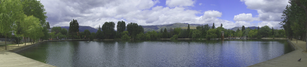 Estany de Puigcerdà, Baixa Cerdanya, Catalunya.